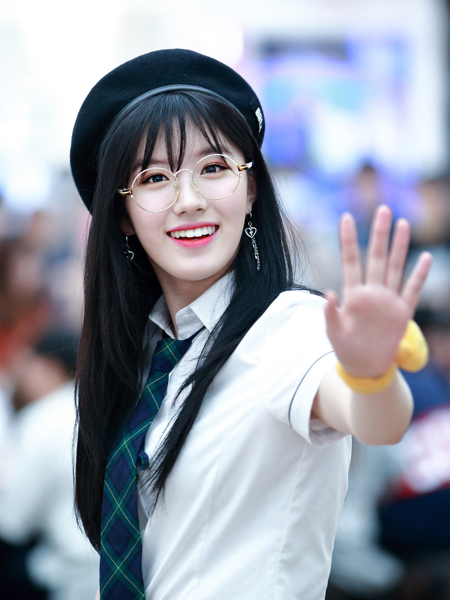 한국어 (조선): 170910 프리스틴 시연 코엑스 팬싸인회